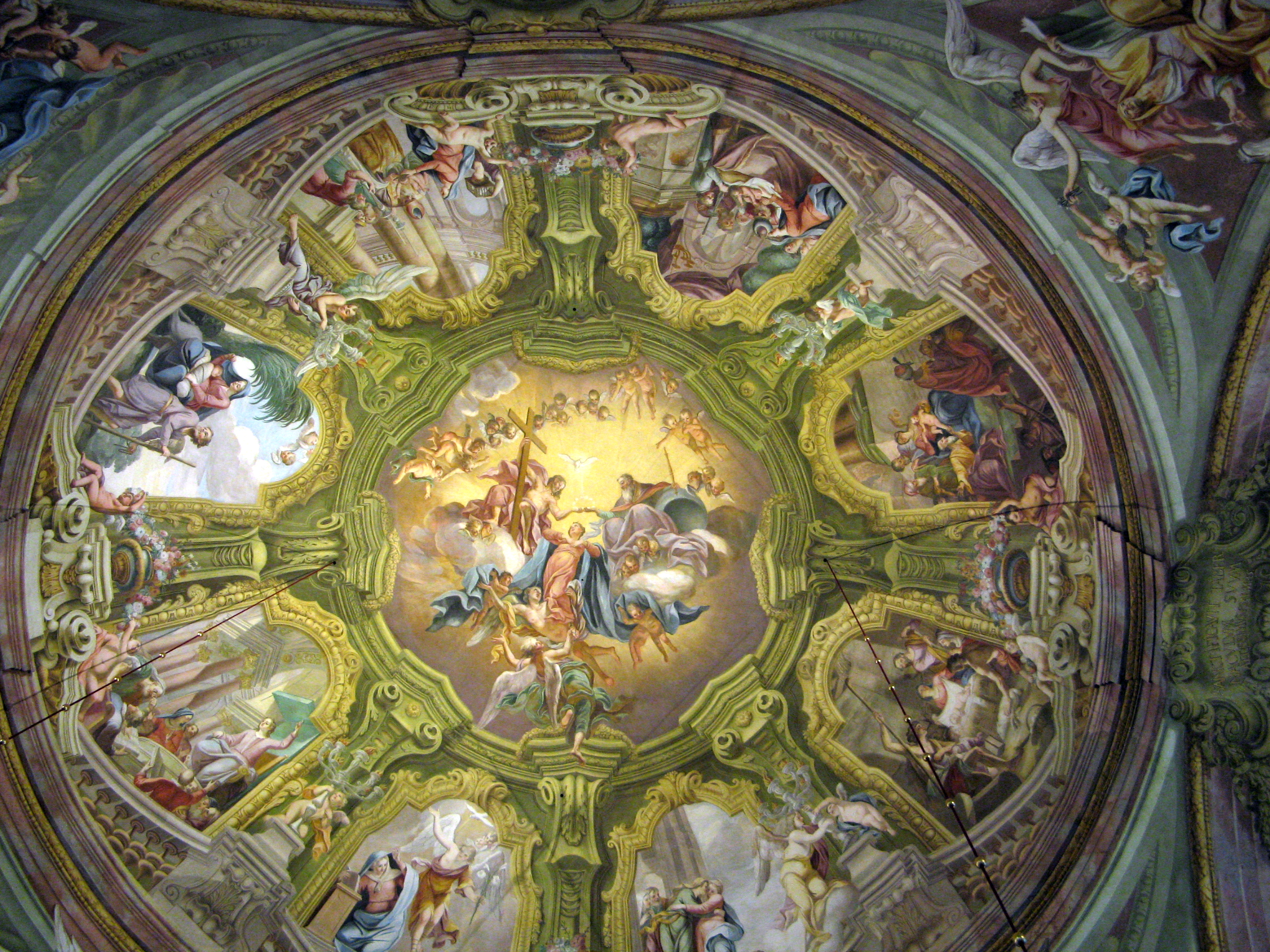 Deckenfresko in der Basilika Maria Taferl